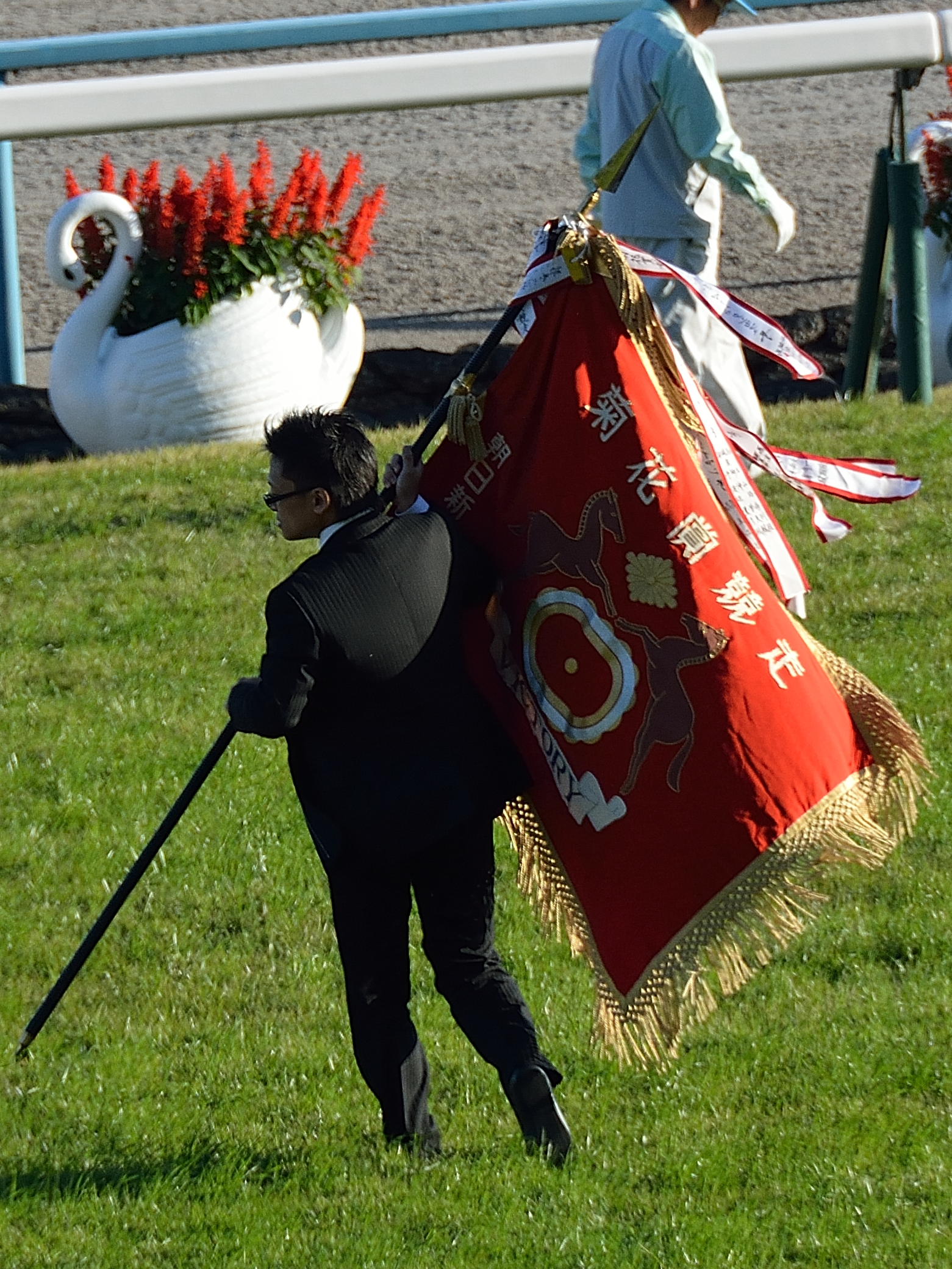 2015年10月25日に京都競馬場で行われた「第76回菊花賞」で、競走後に表彰式に備えて京都競馬場の関係者によって運搬されている菊花賞の優勝旗を、観客席から撮影したもの。